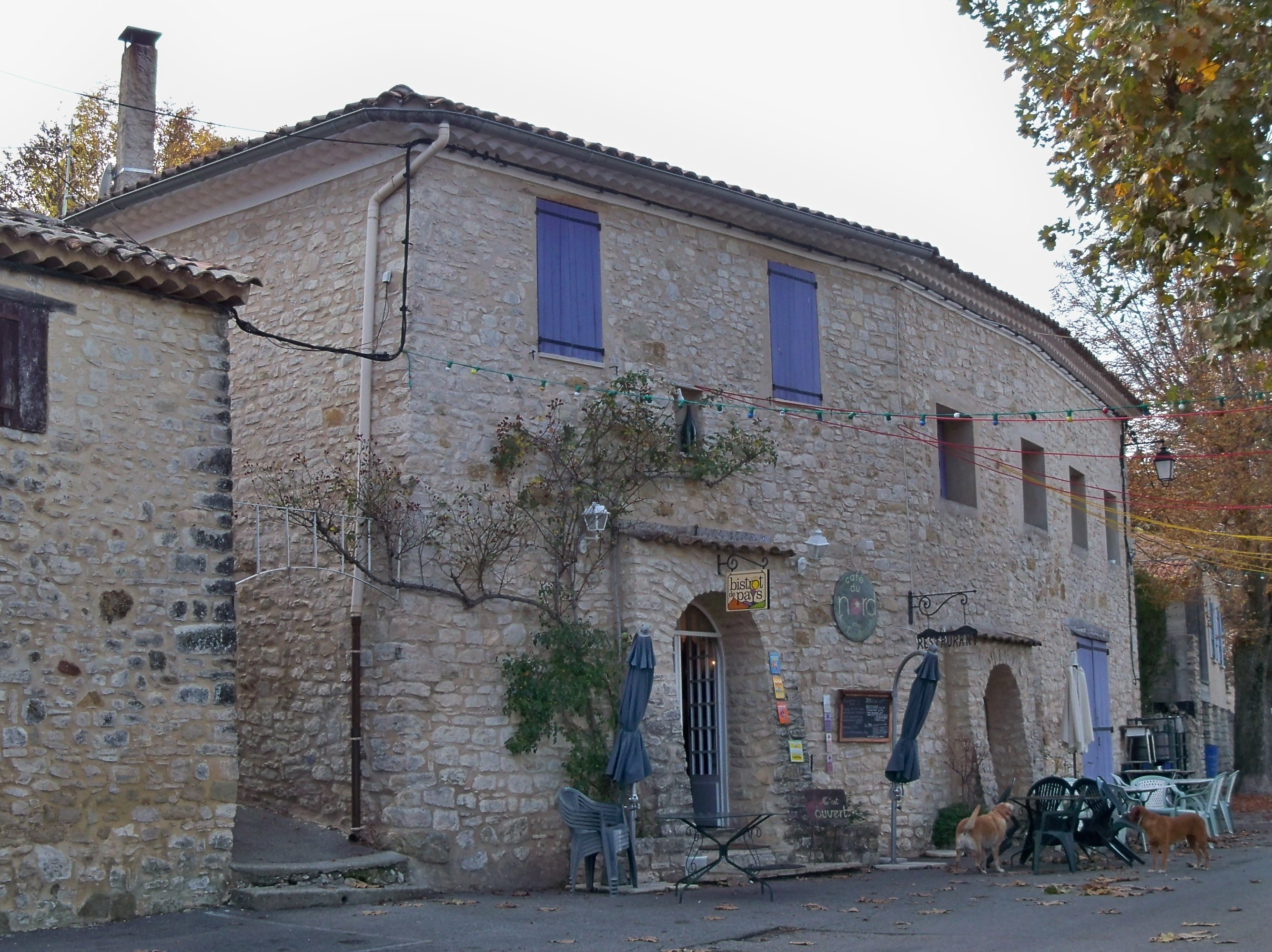 Bistrot de Pays de Limans (04)